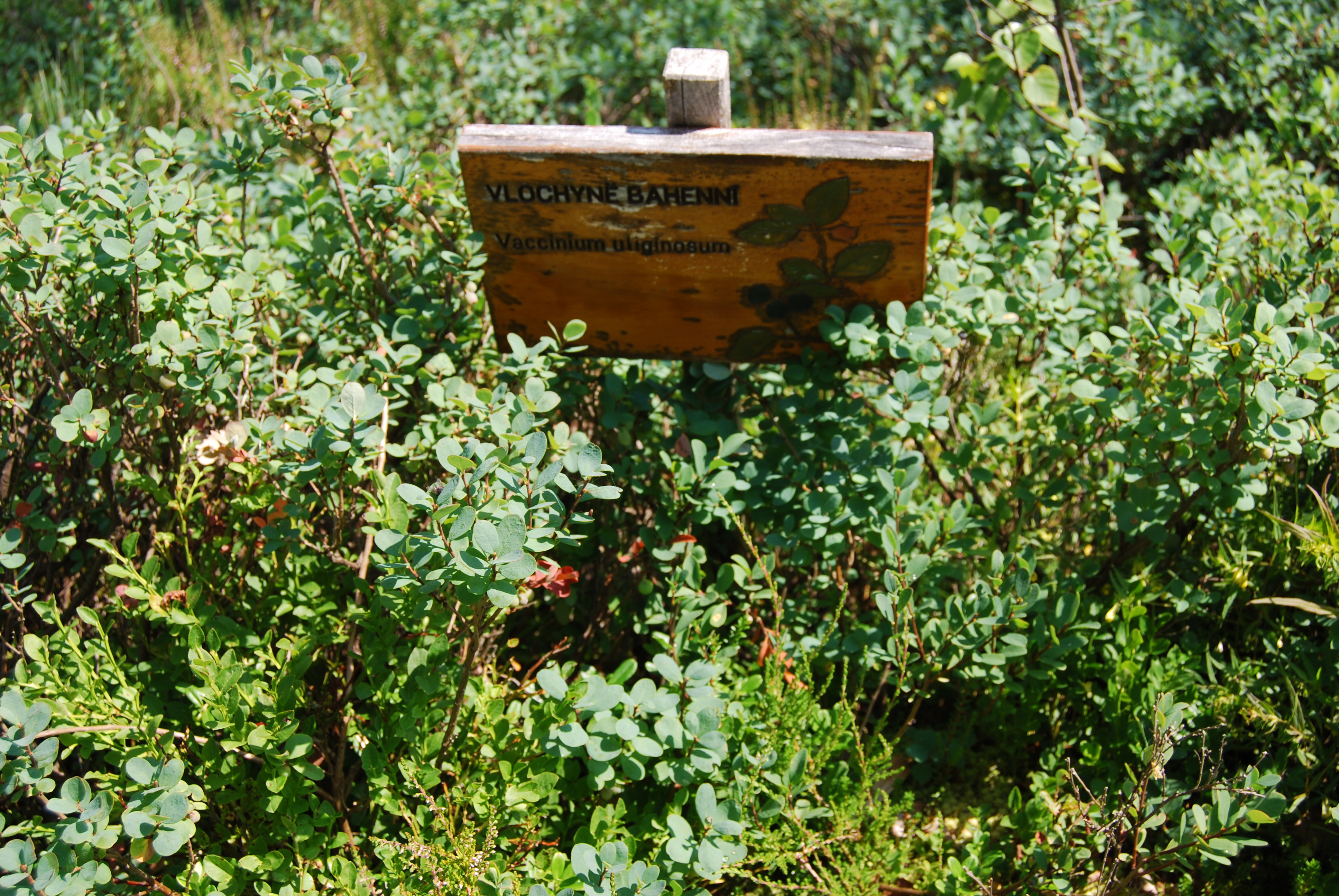 Vlochyně bahenní(Vaccinium uliginosum). Chalupská slať je rašeliniště v katastrálním území Svinná Lada, zhruba 1 km severně od Borových Lad. Česká republika.